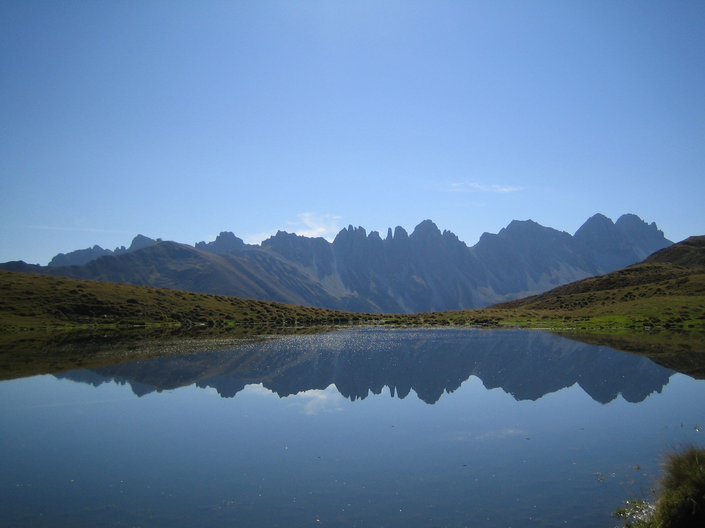 Die Kalkkögel, gespiegelt im Schönangerlsee am Salfeins